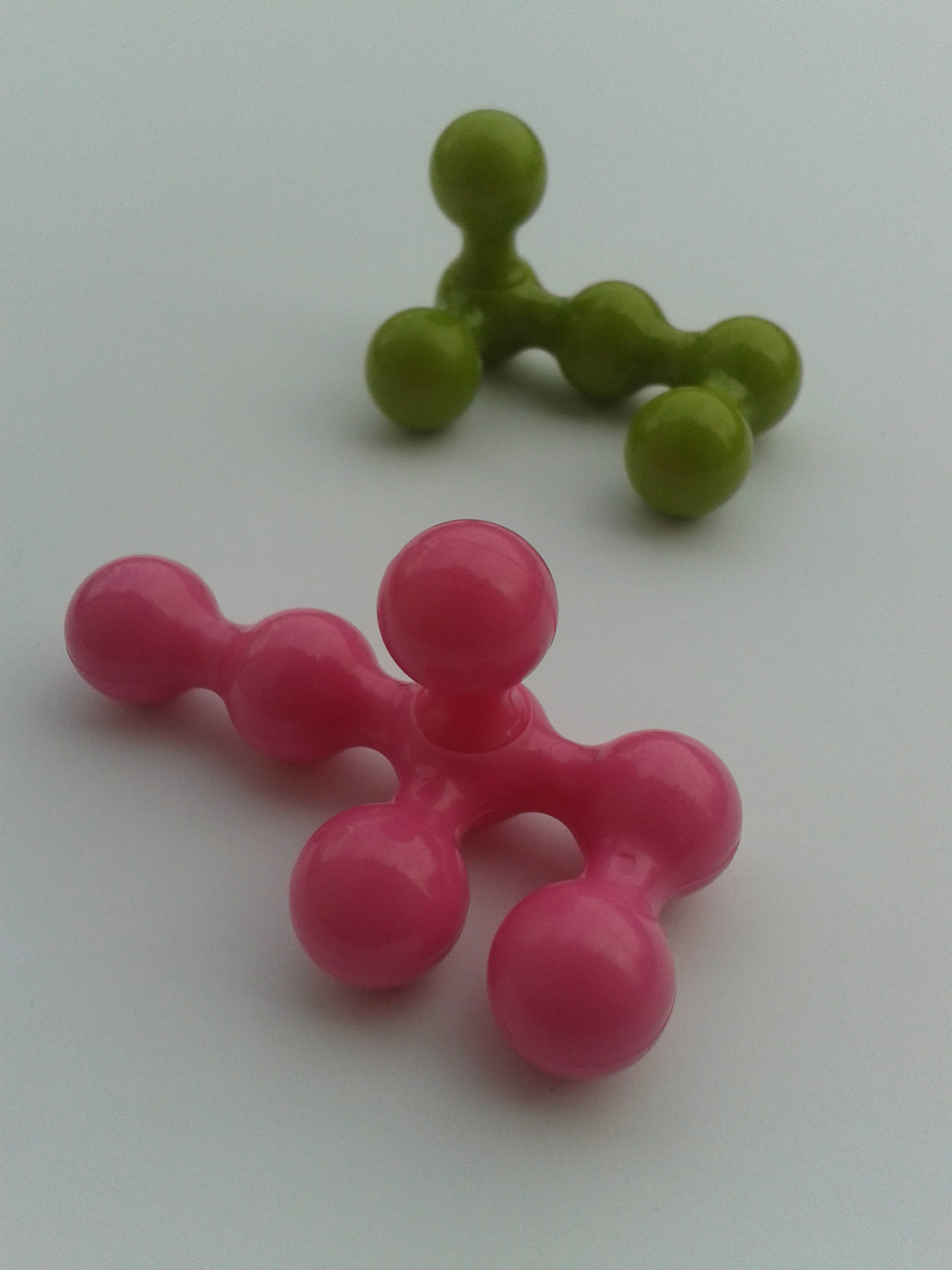 Two pieces from the puzzle game IQFit.